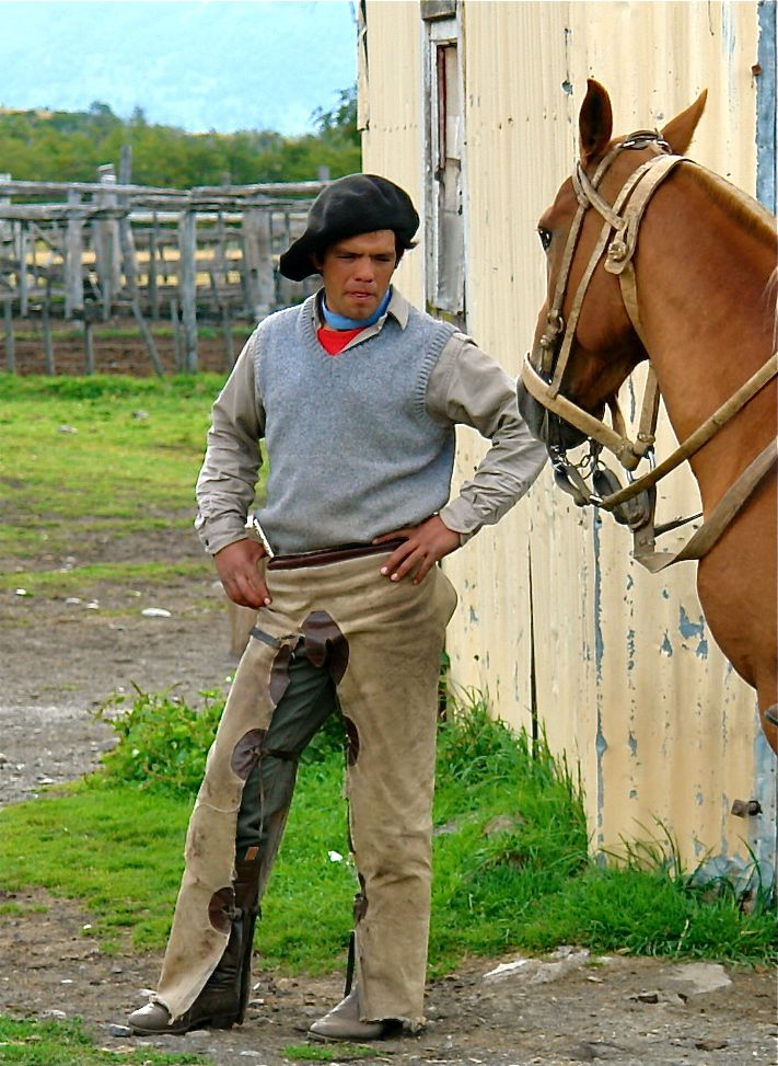 A Gaucho in Argentina.